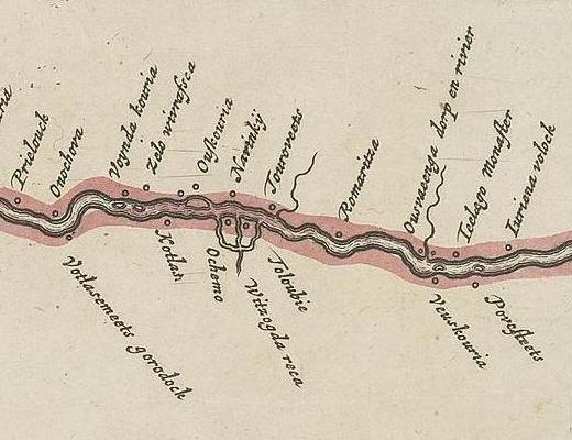 Фрагмент карты Северной Двины в районе Котласа. Карта издана в Амстердаме в 1700